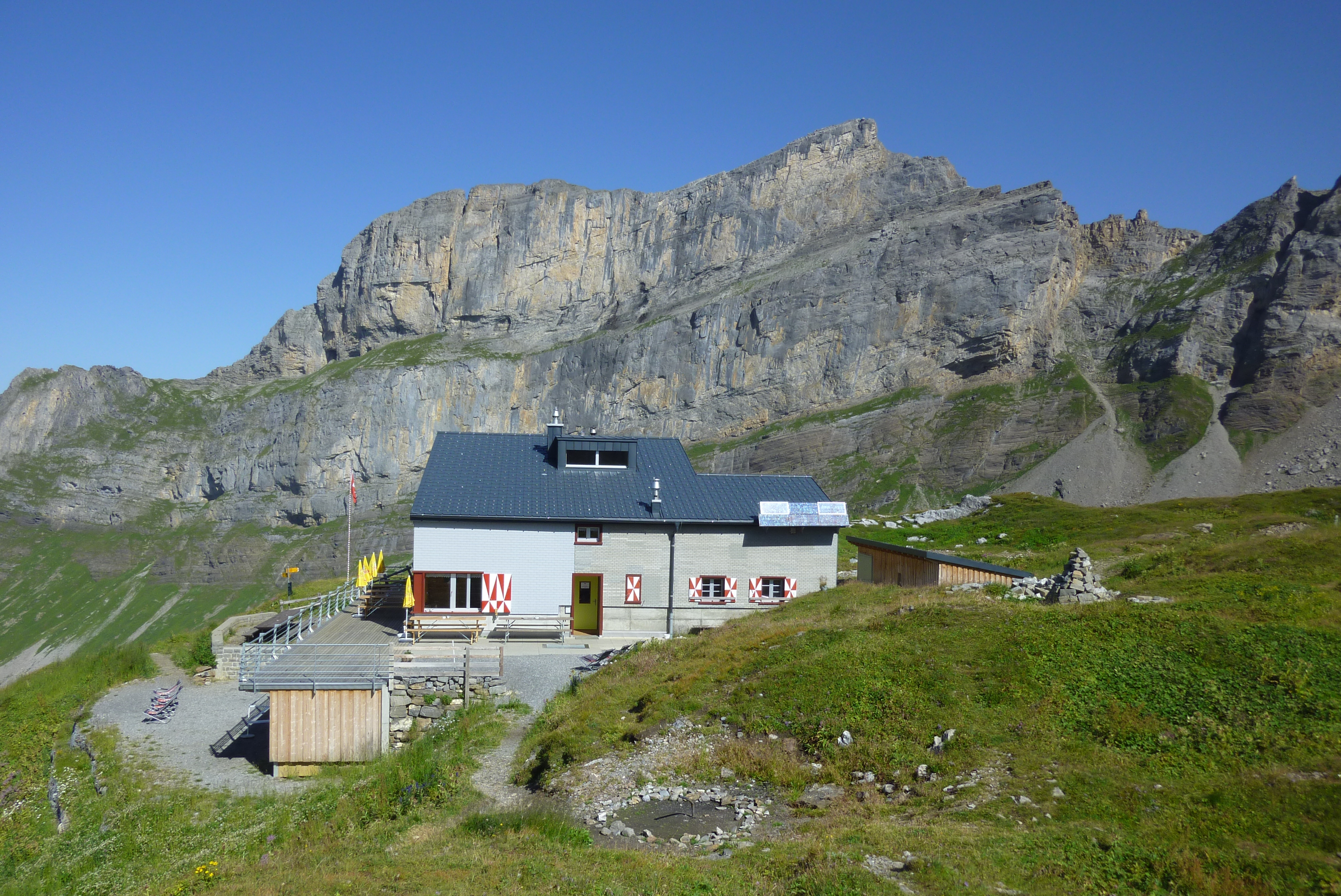 Rugghubelhütte